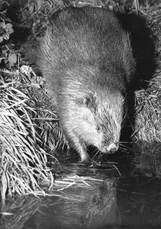 Biber ADN-ZB Link 24.10.1981 Bezirk Magdeburg: Schutz des Elbebibers - Der Biber zählt zu den 21 vom Aussterben bedrohten wildlebenden geschützten Tierarten in der DDR. Der Bestand an Elbebibern, der 1948 bei etwa 150 Exemplaren lag, konnte durch gezielte Schutzmaßnahmen auf 270 Ansiedlungen mit annähernd 1.000 Stück erhöht werden. Zu den besonderen Leitungen der Biologischen Station Steckby des Instituts für Landschaftsforschung und Naturschutz der Akademie der Landwirtschaftswissenschaften rechnen die Umsiedlung von 30 Bibern von der Mulde in die Bezirke Neubrandenburg und Rostock, an einen Verfluer der Havel und in das Peenetal. Die Biologische Station Steckby arbeitet mit anderen wissenschaftlichen Einrichtungen zusammen und ist für die Anleitung der Bezirksarbeitsgruppen "Artenschutz" verantwortlich. Über 200 ehrenamtliche Naturschutzhelfer gewährleisten eine ständige Überwachung der Biber-Betreuungsgebiete sowie Pflege und Erhaltung des Lebensraumes. Mit ihren Beobachtungsergebnissen ermöglichen sie eine jährliche Biber-Bestandszählung.